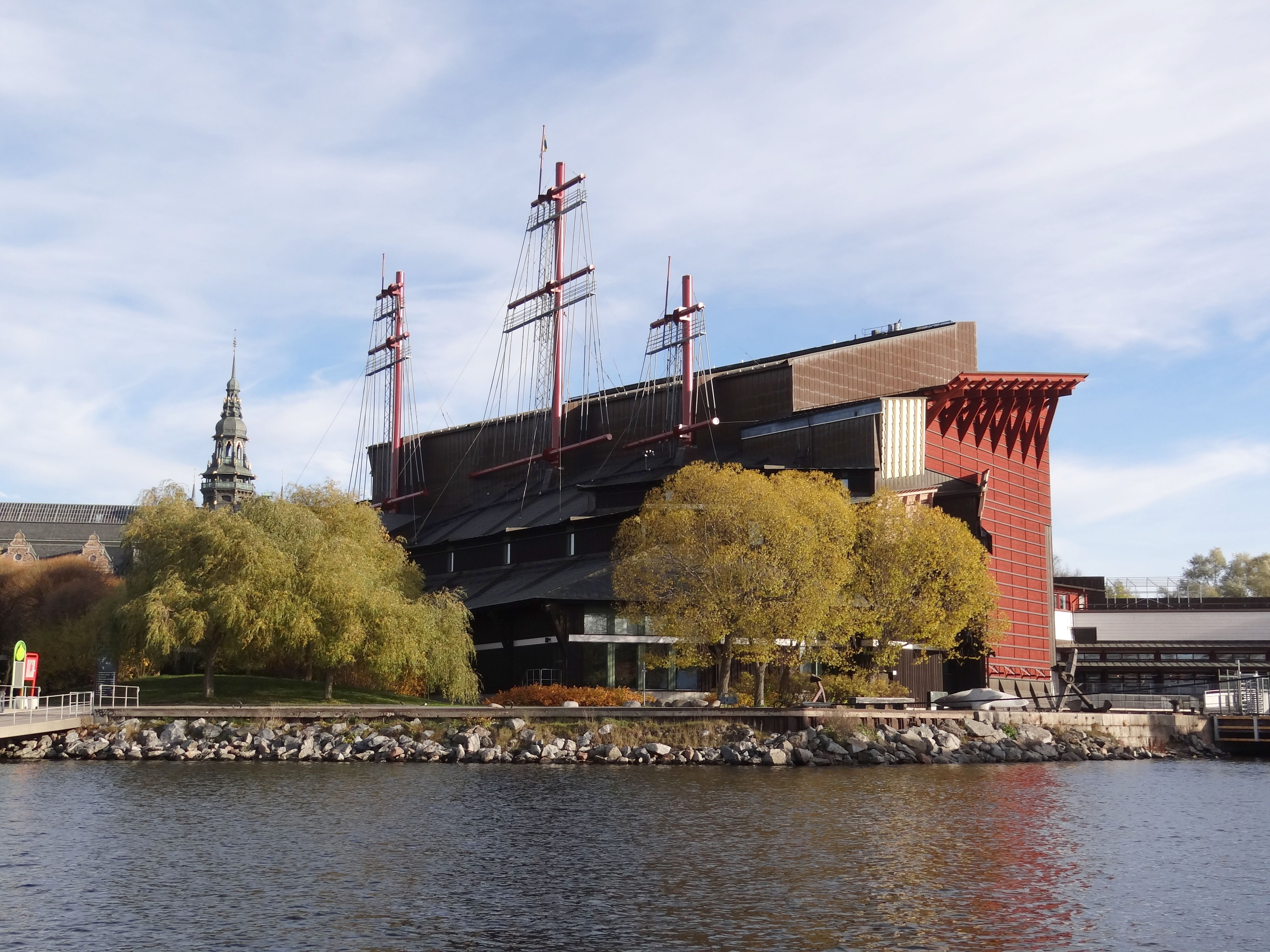 מוזיאון ואסה הוא מוזיאון ימי בסטוקהולם שבשוודיה. הוא מציג את "ואסה", אוניית מפרשים מלחמתית מן המאה ה-17. האונייה טבעה בהפלגת הבכורה שלה ב-1628, ונמשתה מקרקעית הים ב-1961 כשהיא שלמה כמעט לחלוטין בצילום מבנה המוזיאון מבט מהים